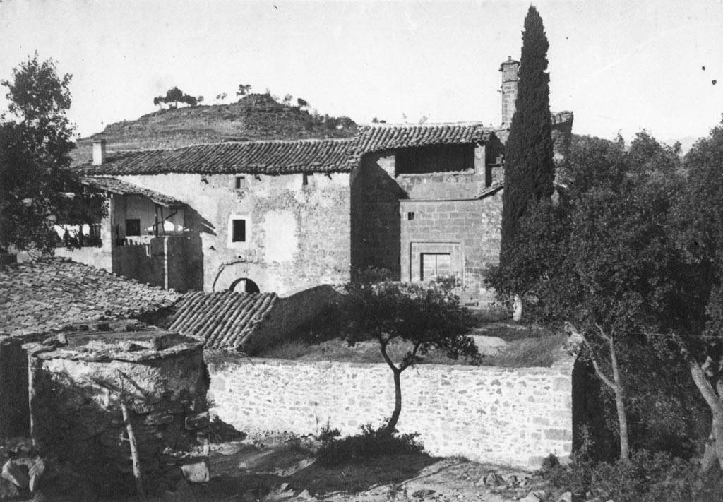 Vista parcial del Pujol de Planès. Cèsar August Torras i Ferreri (Entre 1890 i 1923) This is a a photo of a natural area in Catalonia, Spain, with id: ES510162